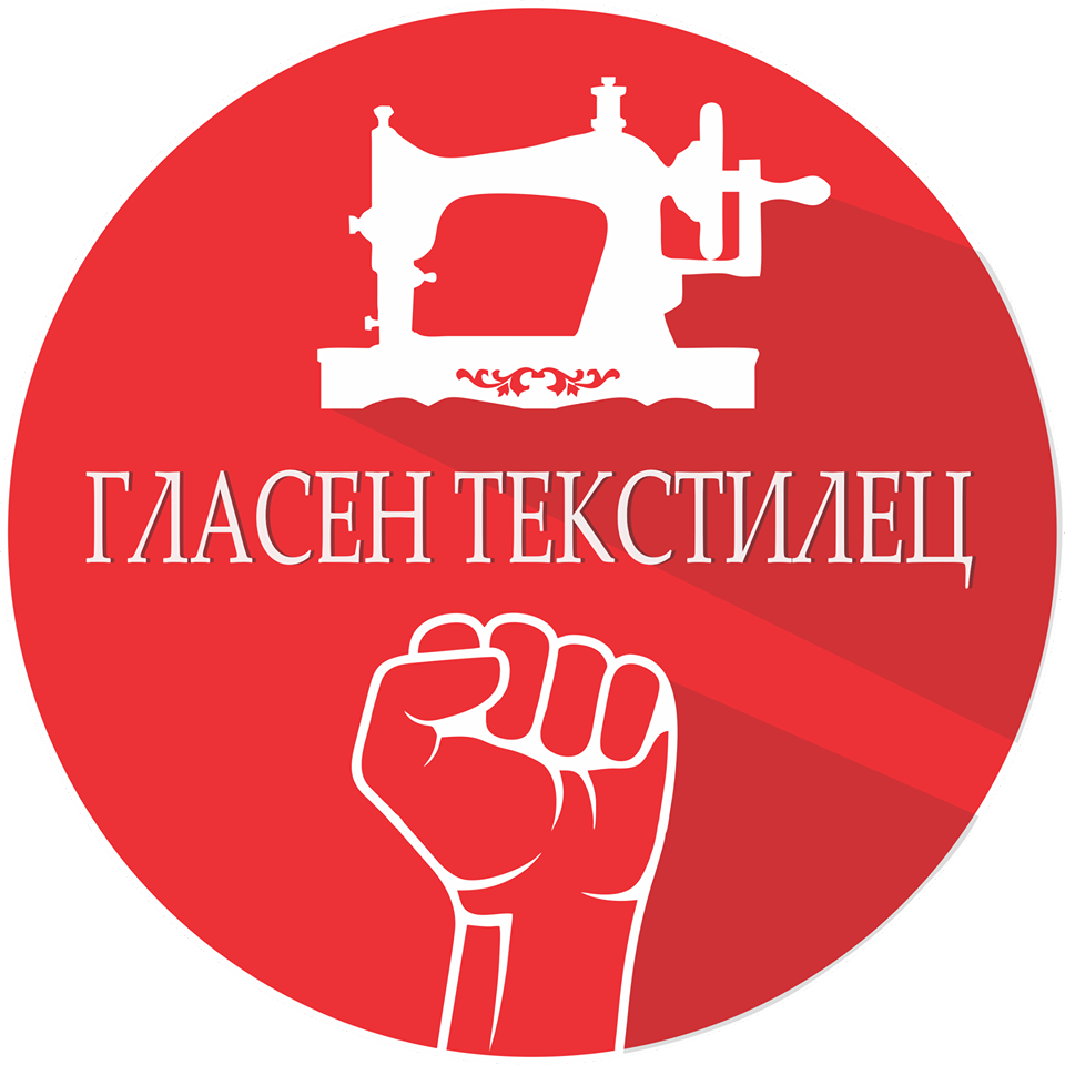 Здружение на граѓани од текстилната, кожарската и чевларската индустрија